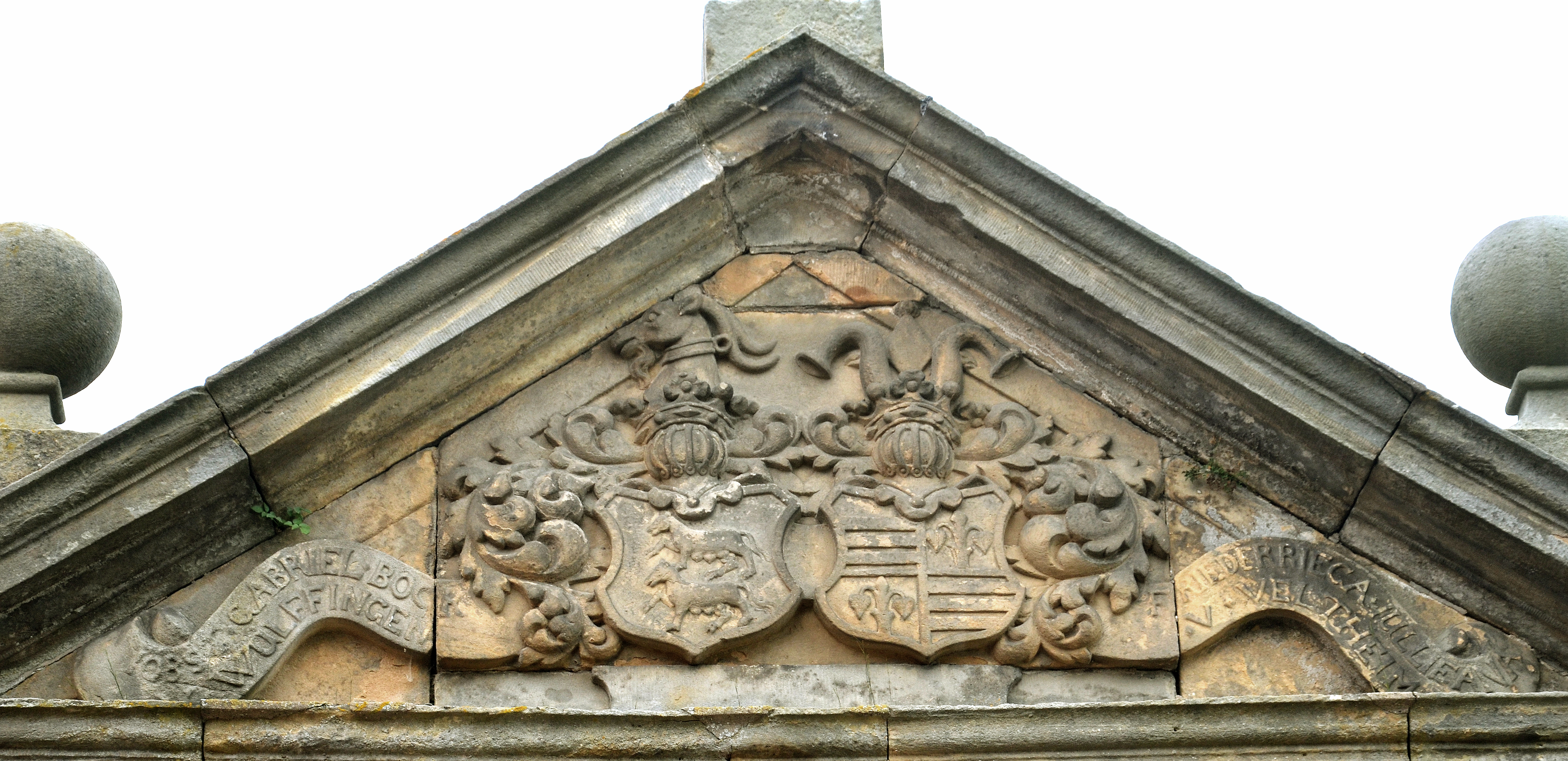 Über dem Eingangstor zum Rittergut Bockerode findet sich über der Jahreszahl 1722 die tympanonähnlichen Bekrönung mit den Wappen und den Inschriften Iobst Gabriel Bock Bock v. Wülfingen und der Friederrica Jullieana v. Veltheim ...